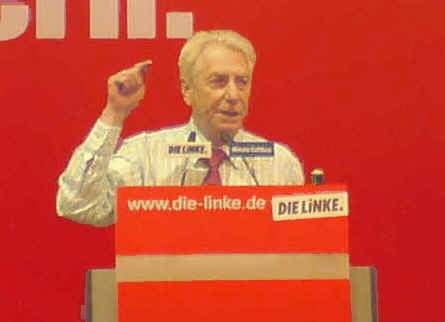 Wolfgang Gehrcke auf dem Bundesparteitag der Linken in Cottbus